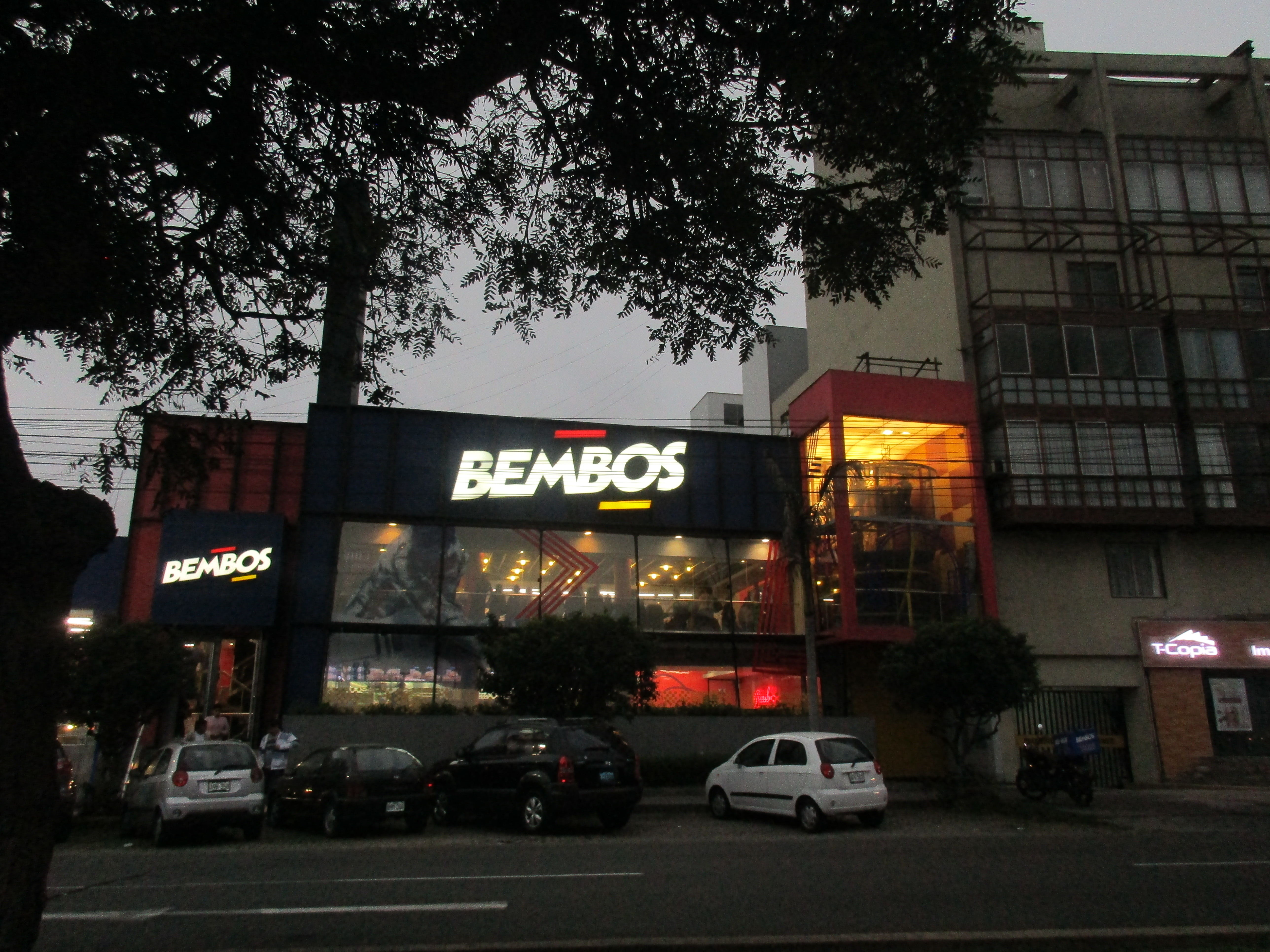 Local de Bembos en Lima, Perú.